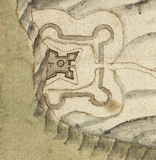 Détail d'un plan de Boulogne sur Mer au XVIIIè siècle, représentant la Tour d'Odre. Collection d'Anville. Gallica BNF